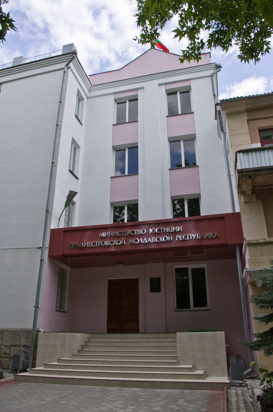 Министерство юстиции ПМР расположено на улице Ленина в Тирасполе